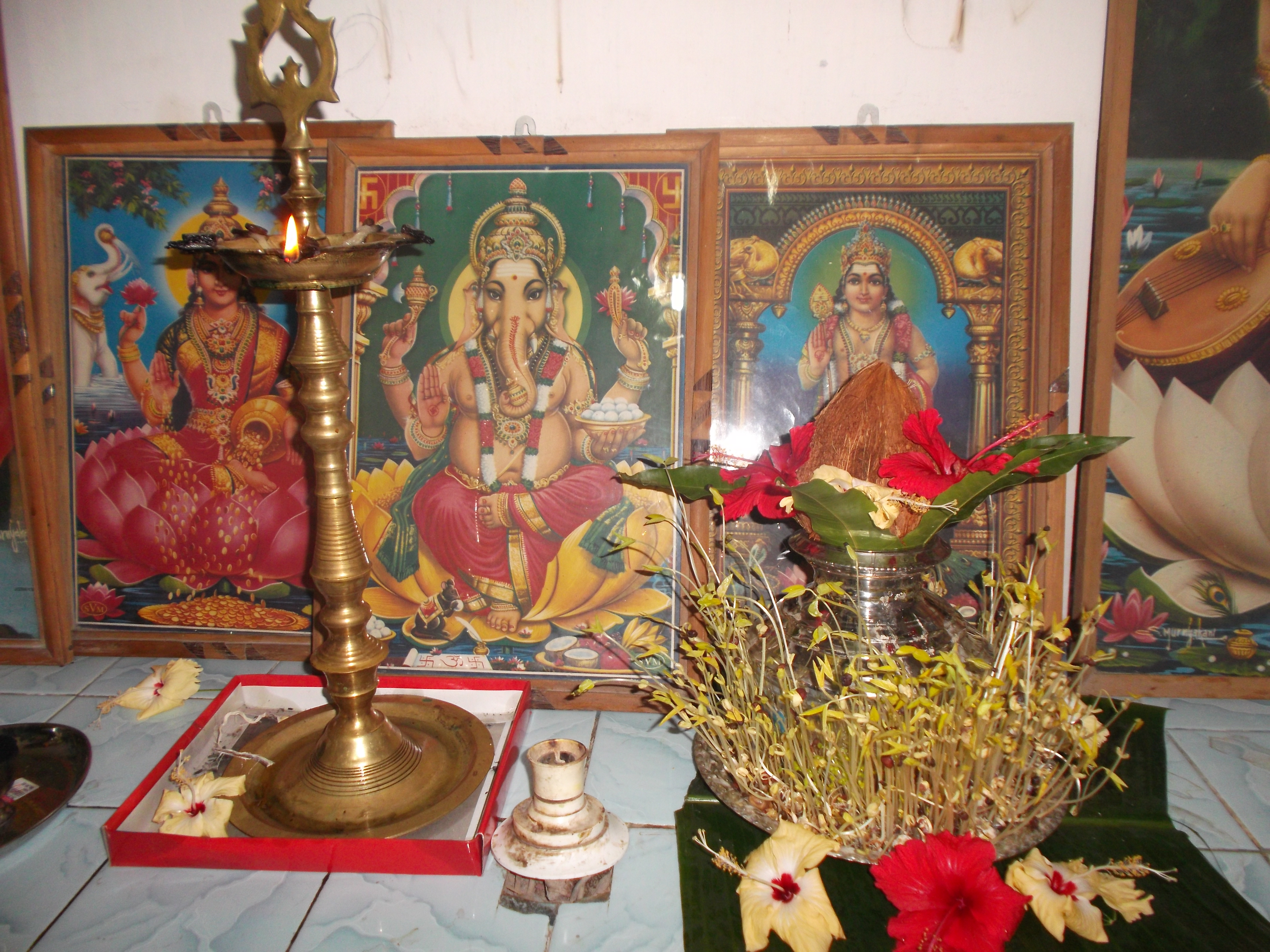 பூசை அறையில் வைக்கப்பட்ட நிறைகுடம்